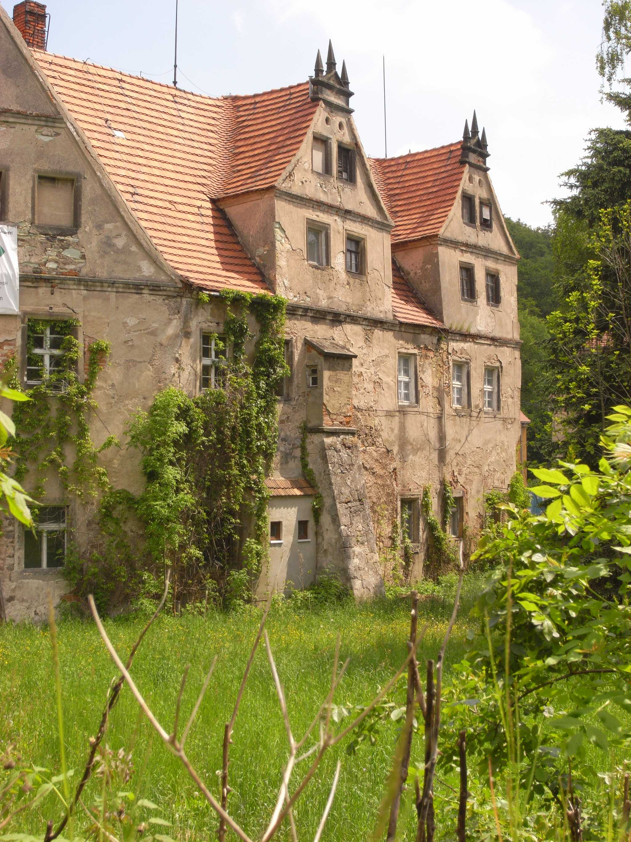 Kreischa-Lungkwitz, altes Schloß (1411 erstmals erwähnt als Rittergut) (Sachsen, Deutschland)